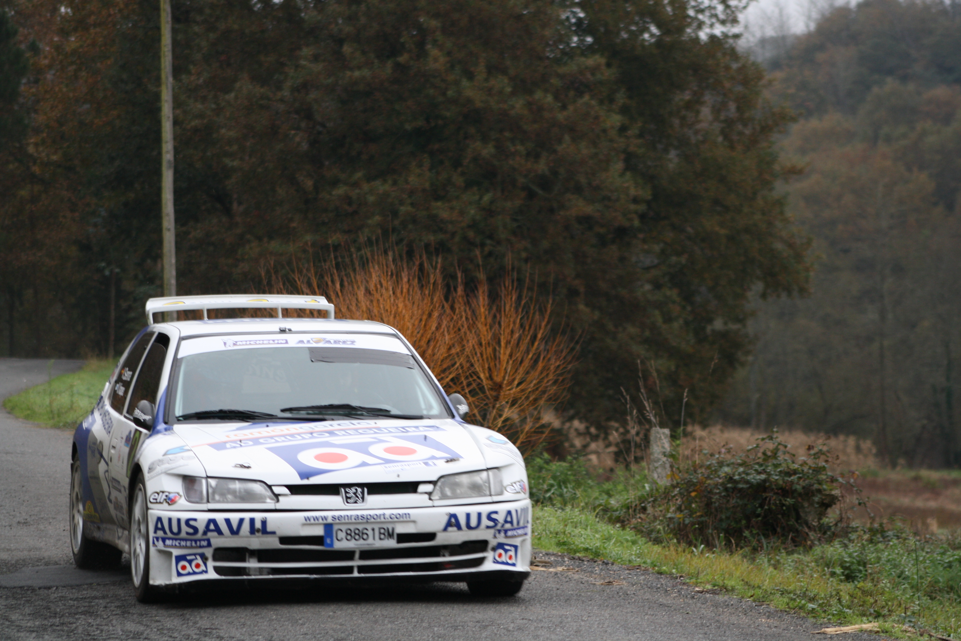 Rally Botafumeiro 2012 - tramo de Sarandón .